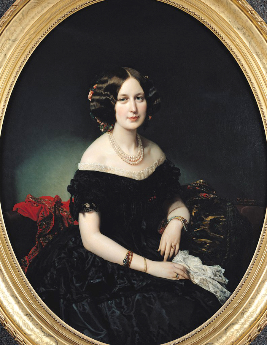 Portrait de la baronne de Weisweiller, née Adeline Helbert